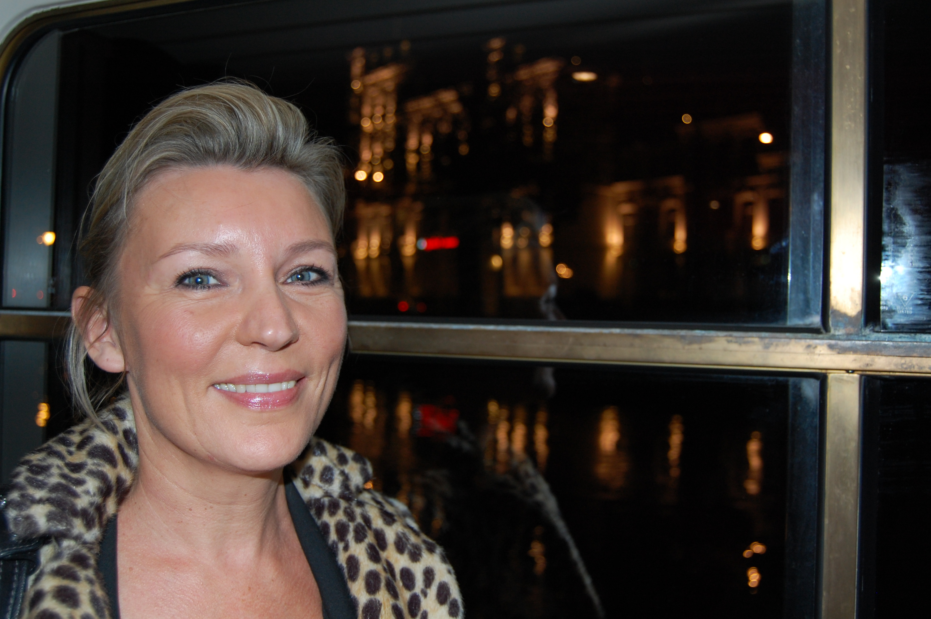 Saskia Noort, Nederlands schrijfster